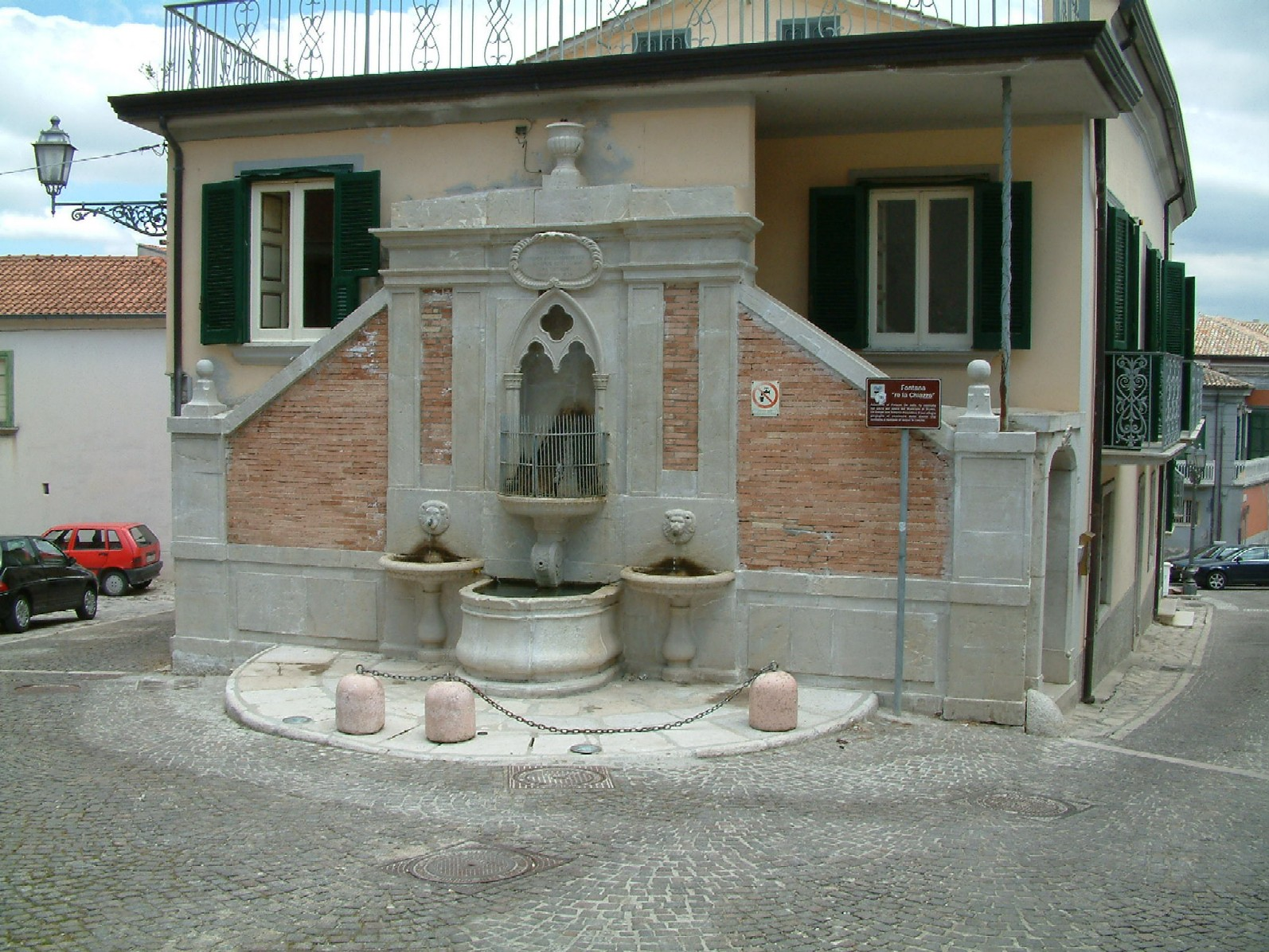 Sturno Summary Sturno Fontana re la Chiazza